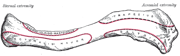 Left clavicle. Superior surface.